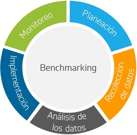 Benchmarking